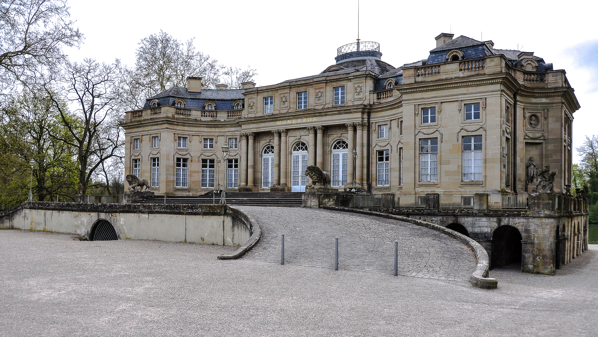 Auf der Nordwestseite befindet sich die Vorfahrt und der Eingang. Er erhebt sich über dem Sockelgeschoss. Die Form der Vorfahrt korrespondiert mit der der angedeuteten Seitenflügel.